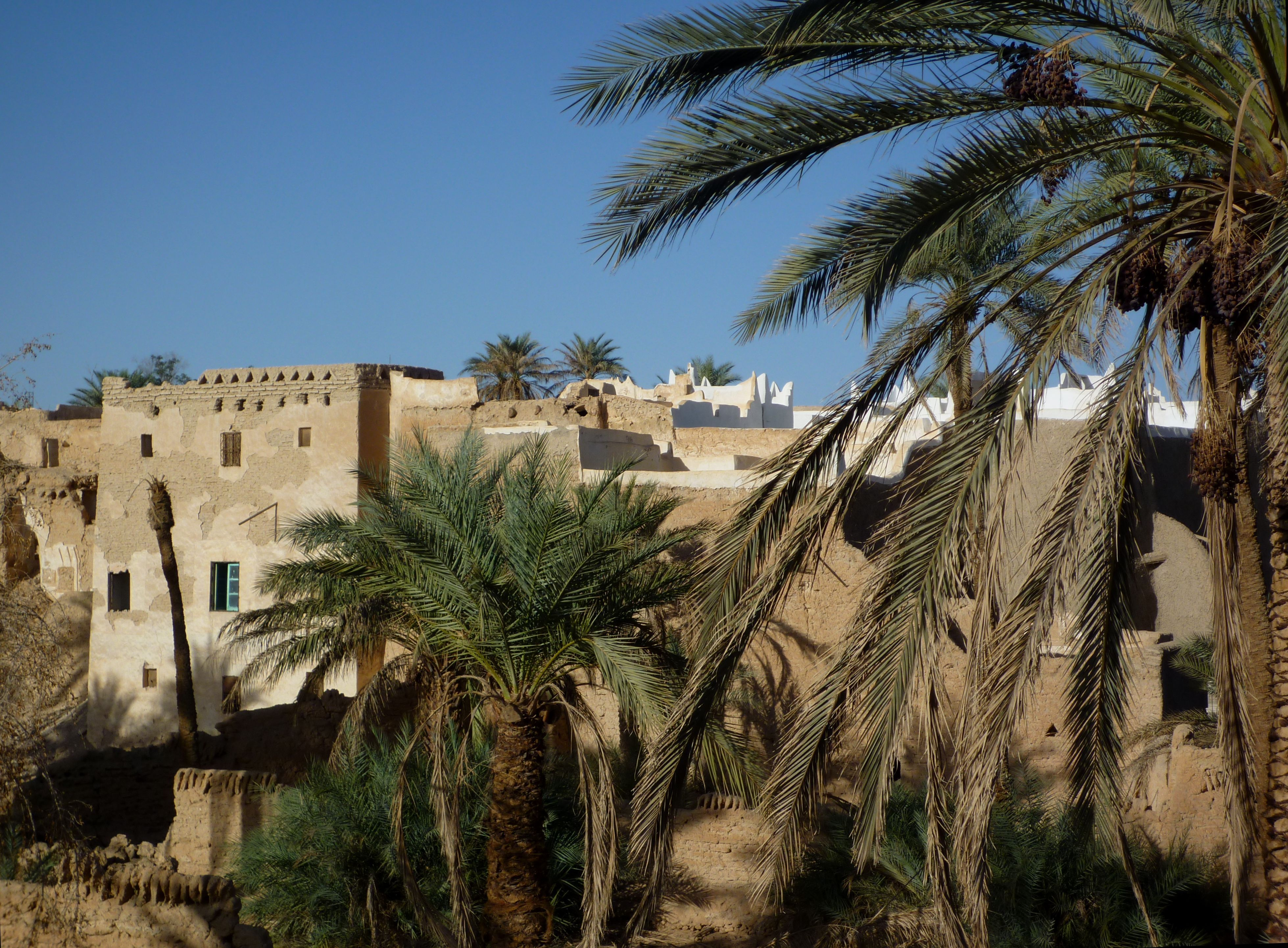 Ghadames - Altstadt-Palmenhain